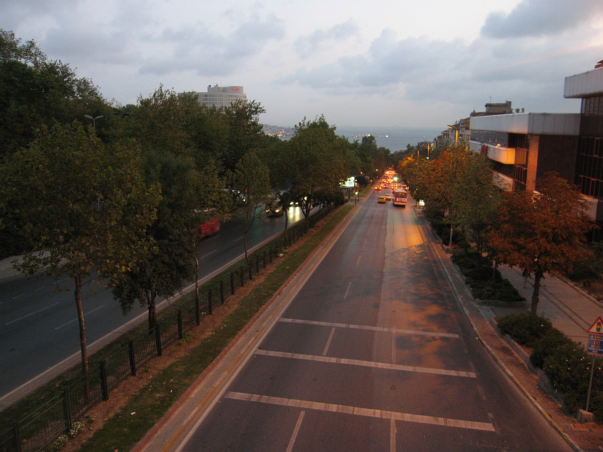 Barbaros Boulevard in Yıldız, Beşiktaş, Istanbul.